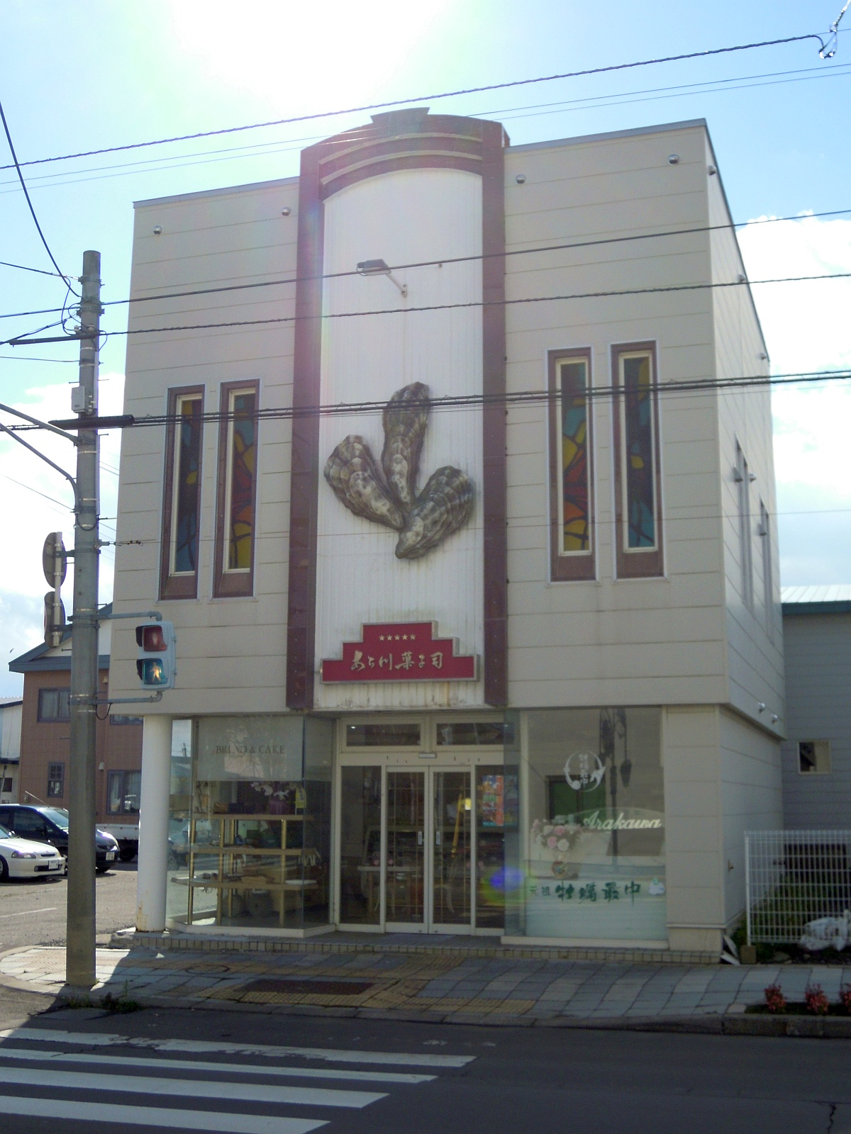 北海道厚岸郡厚岸町にあるあら川菓子司の外観